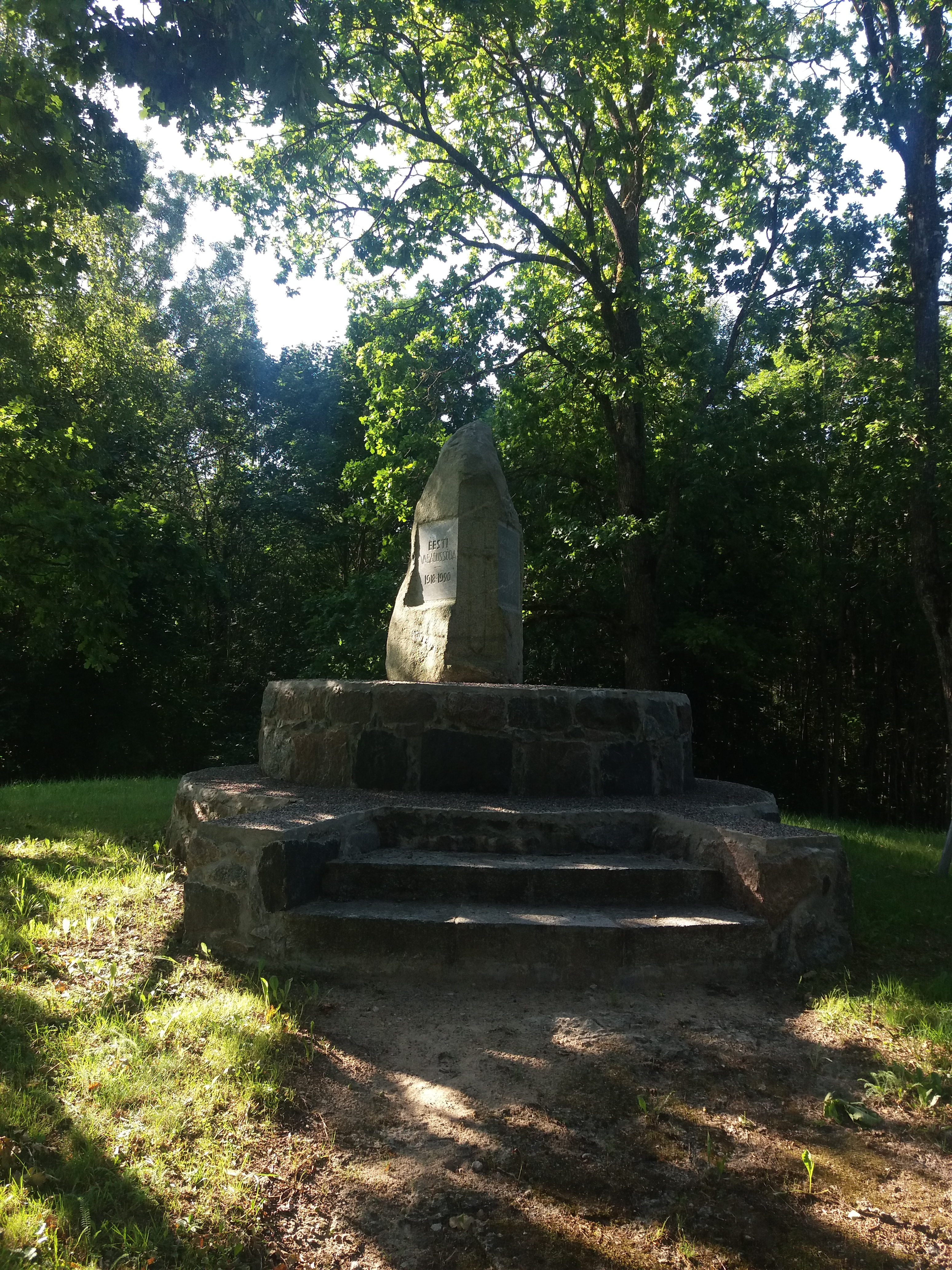 Müüsleri mälestusmärk